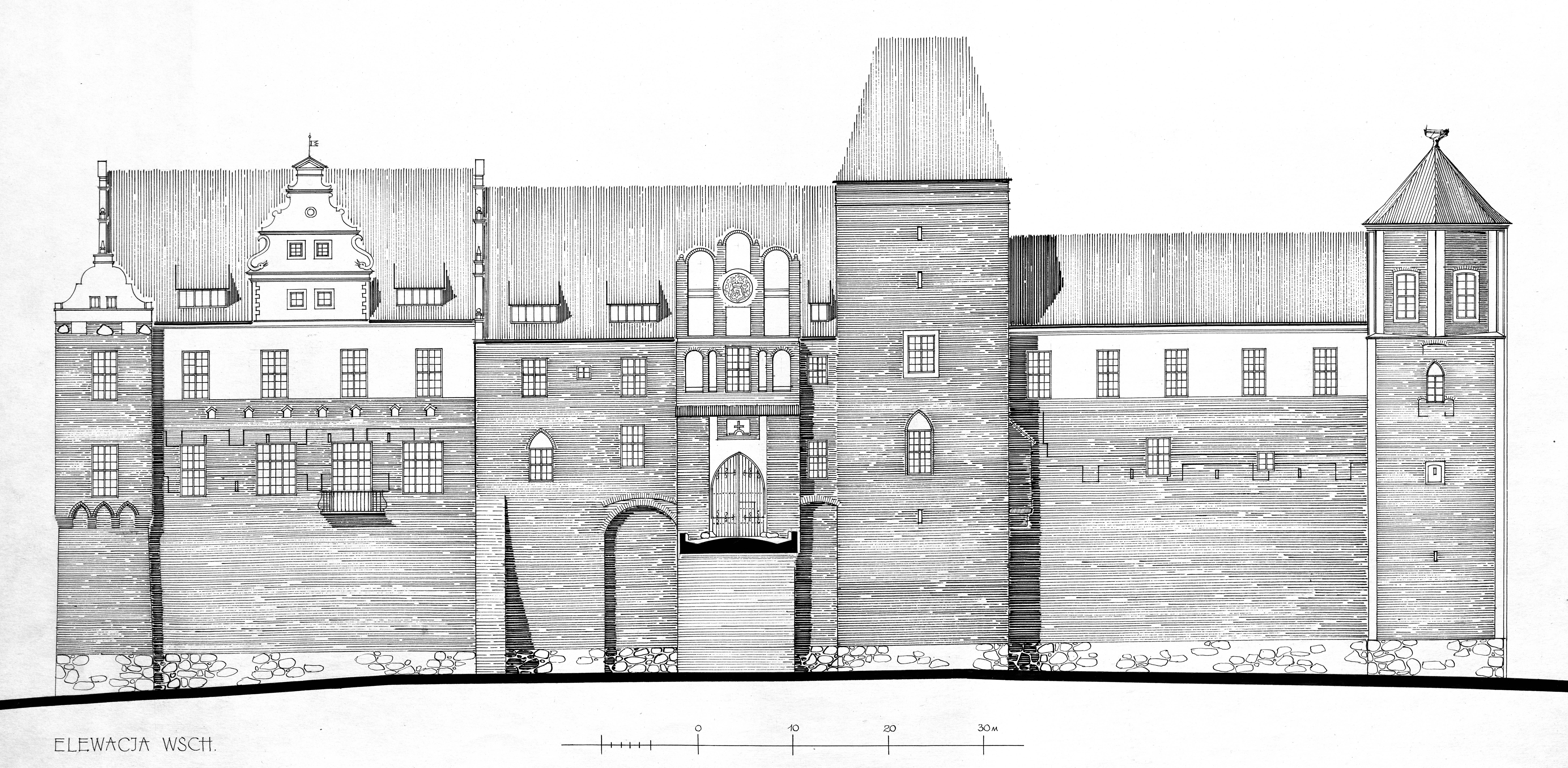 Rysunek z pracy dyplomowej Andrzeja Macura - projektu adaptacji zamku w Szymbarku